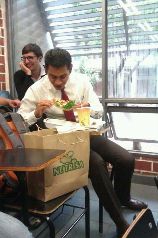 estudiante comiendo en horas de clases